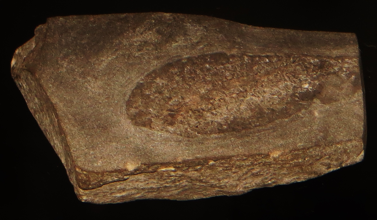 Fossil of Lasanius - Took the picture at Museon, Den Haag